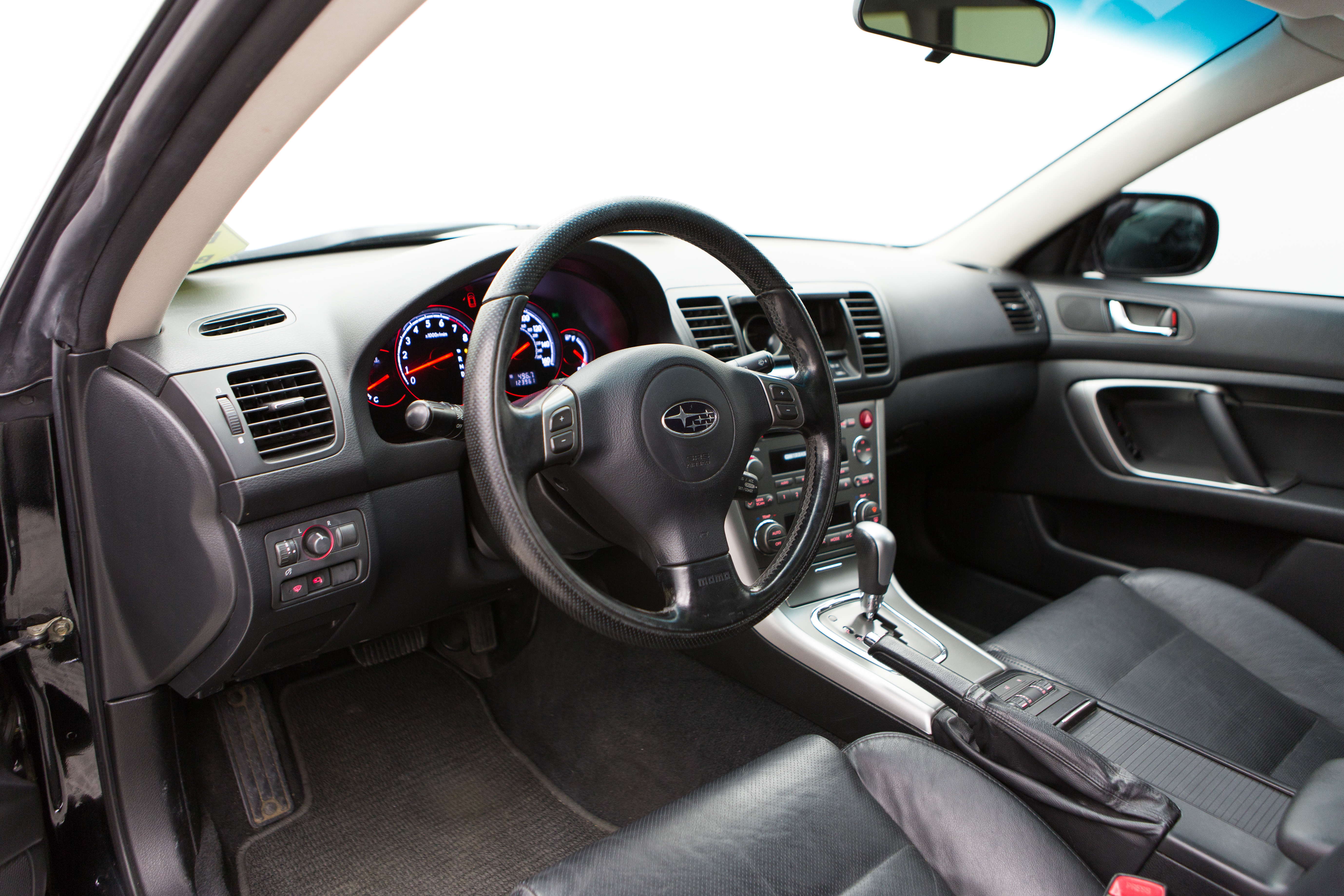 366A7181